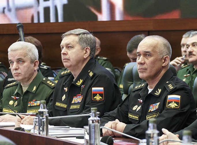 Начальник Национального центра управления обороной Российской Федерации генерал-полковник Михаил Евгеньевич Мизинцев, Заместитель начальника Генерального штаба Вооружённых сил Российской Федерации — начальник Главного управления Генерального штаба Вооружённых сил Российской Федерации адмирал Игорь Олегович Костюков и Начальник Главного организационно-мобилизационного управления Генерального штаба Вооруженных Сил Российской Федерации — заместитель начальника Генерального штаба Вооруженных Сил Российской Федерации генерал-полковник Евгений Владимирович Бурдинский на заседание Коллегии Министерства обороны Российской Федерации